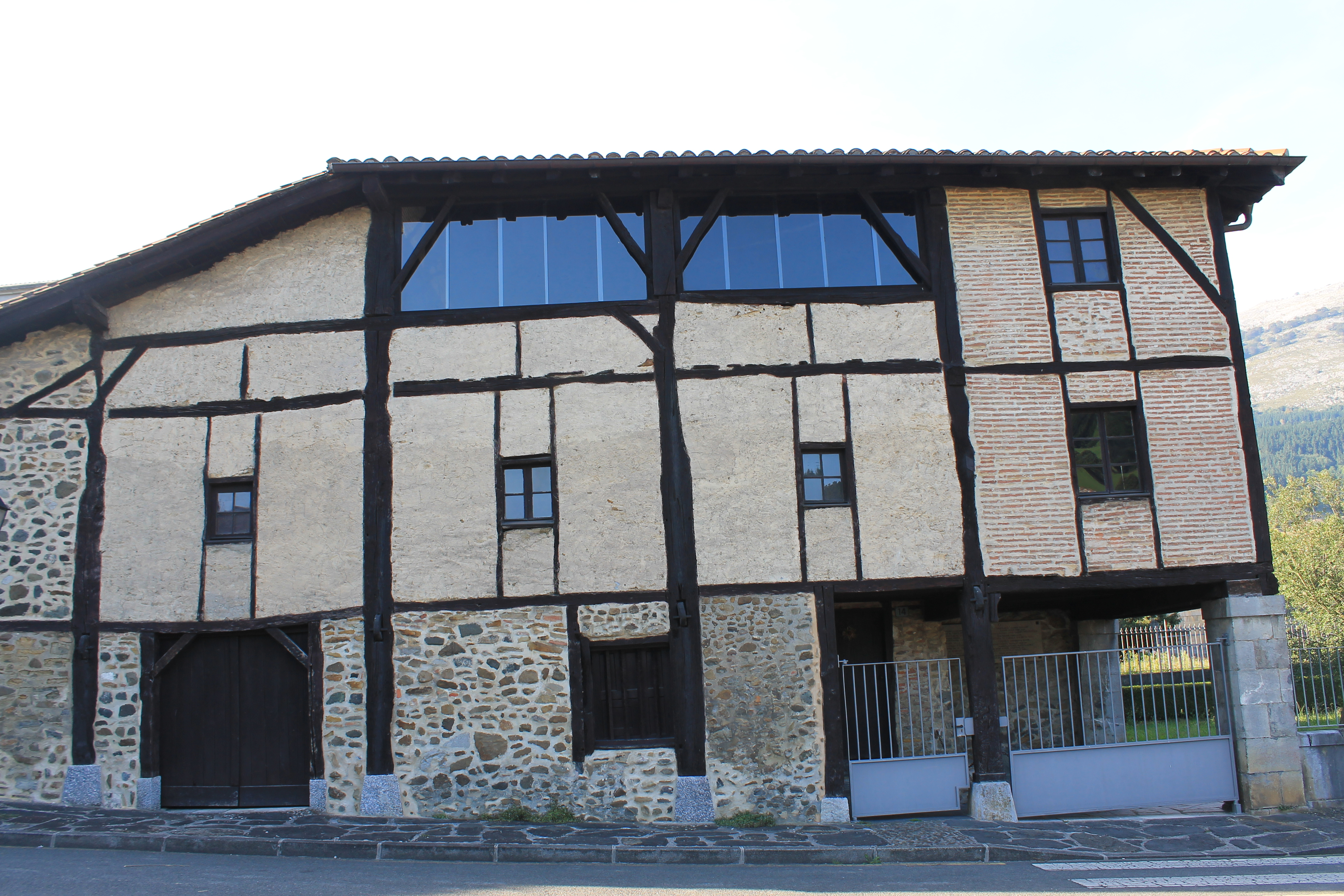 Casa natal del Hermano Garate. De la orden de San Ignacio. Situada a escasos cien metros de la basilica.